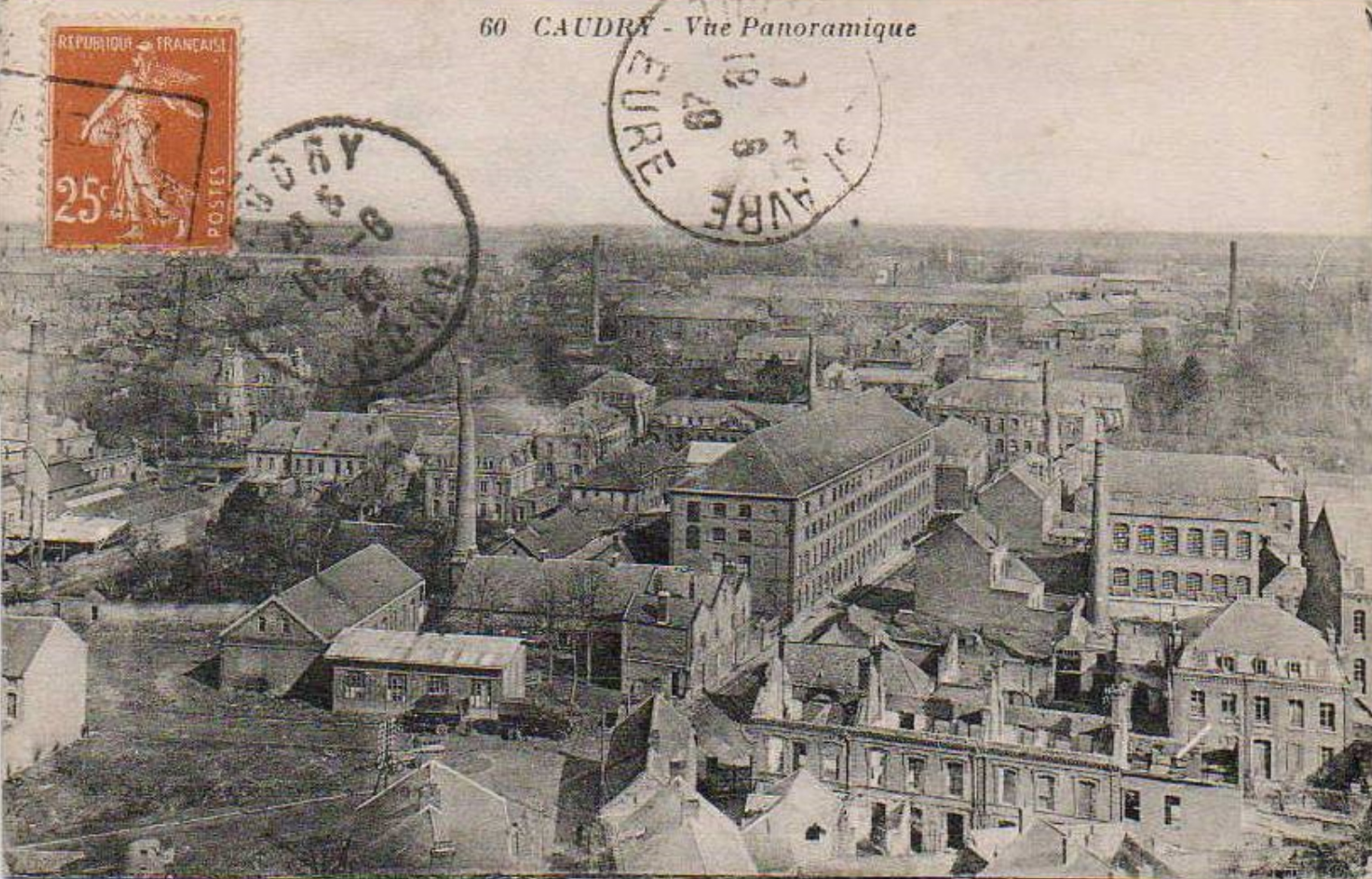 Vue panoramique de Caudry en 1929, Nord, Nord-Pas-de-Calais, France.